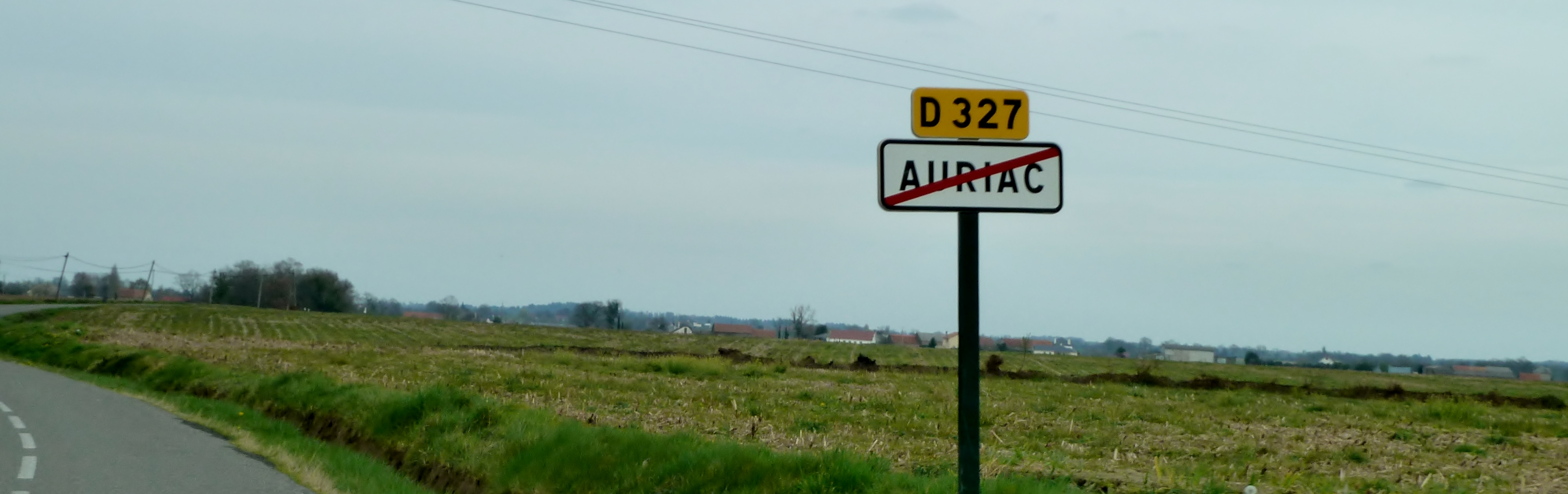 Sortie d'Auriac (Pyrénées-Atlantiques)